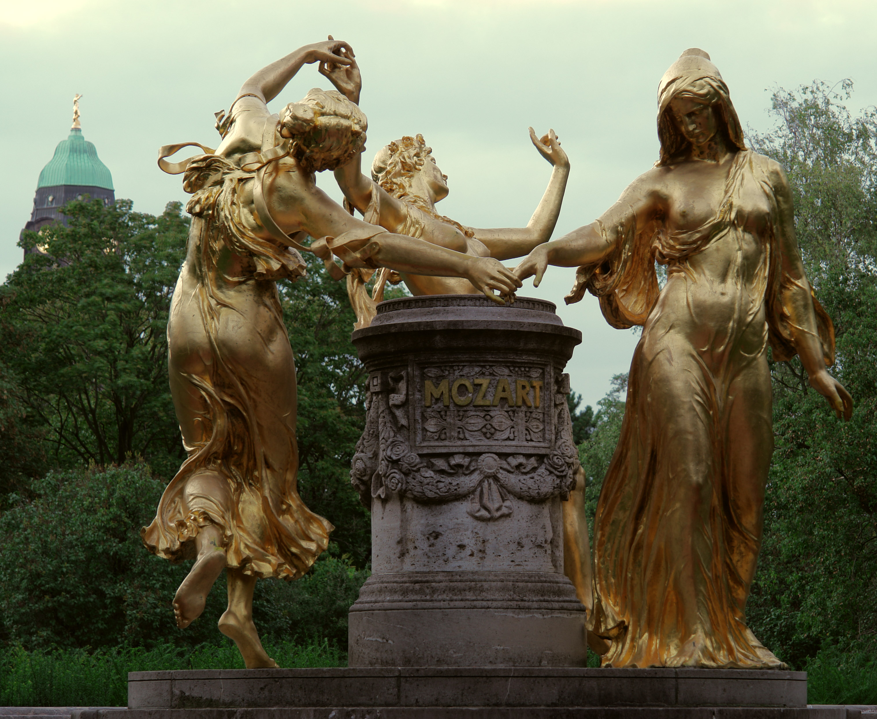 Mozart-Denkmal in der Parkanlage Bürgerwiese Drei Figuren Anmut-Heiterkeit-Ernst 1907 von Hermann Hosaeus erbaut 1945 zerstört 1989/91 restauriert